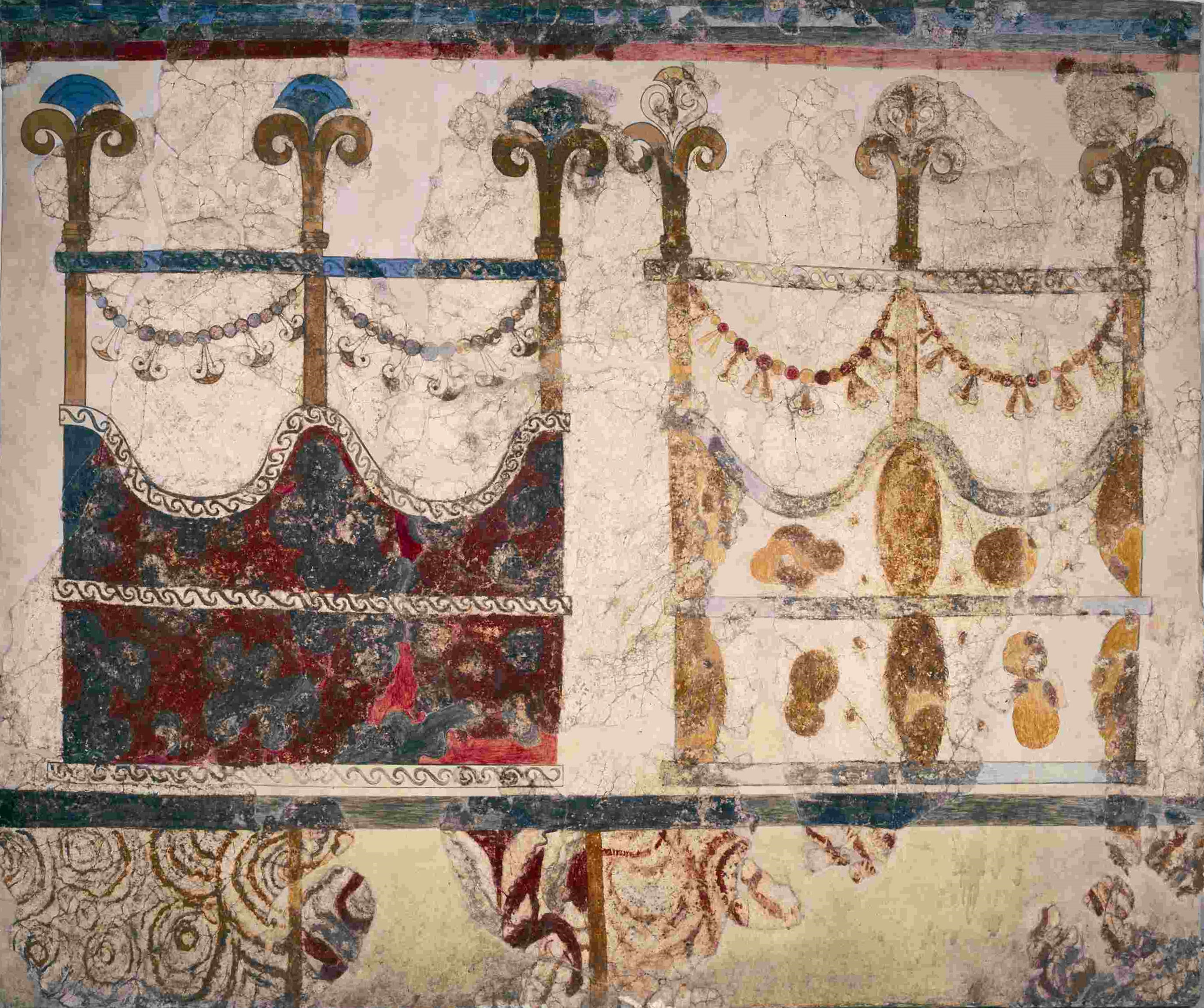 Darstellung zweier Kapitänskajüten auf einem Fresko an der Südostwand des Raumes 4 im Obergeschoss des Westhauses der Ausgrabungsstätte in Akrotiri auf Santorin, Kykladen, Griechenland